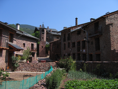 Llagunes, Pallars Sobirà, Lleida, Catalunya. Any 2006.